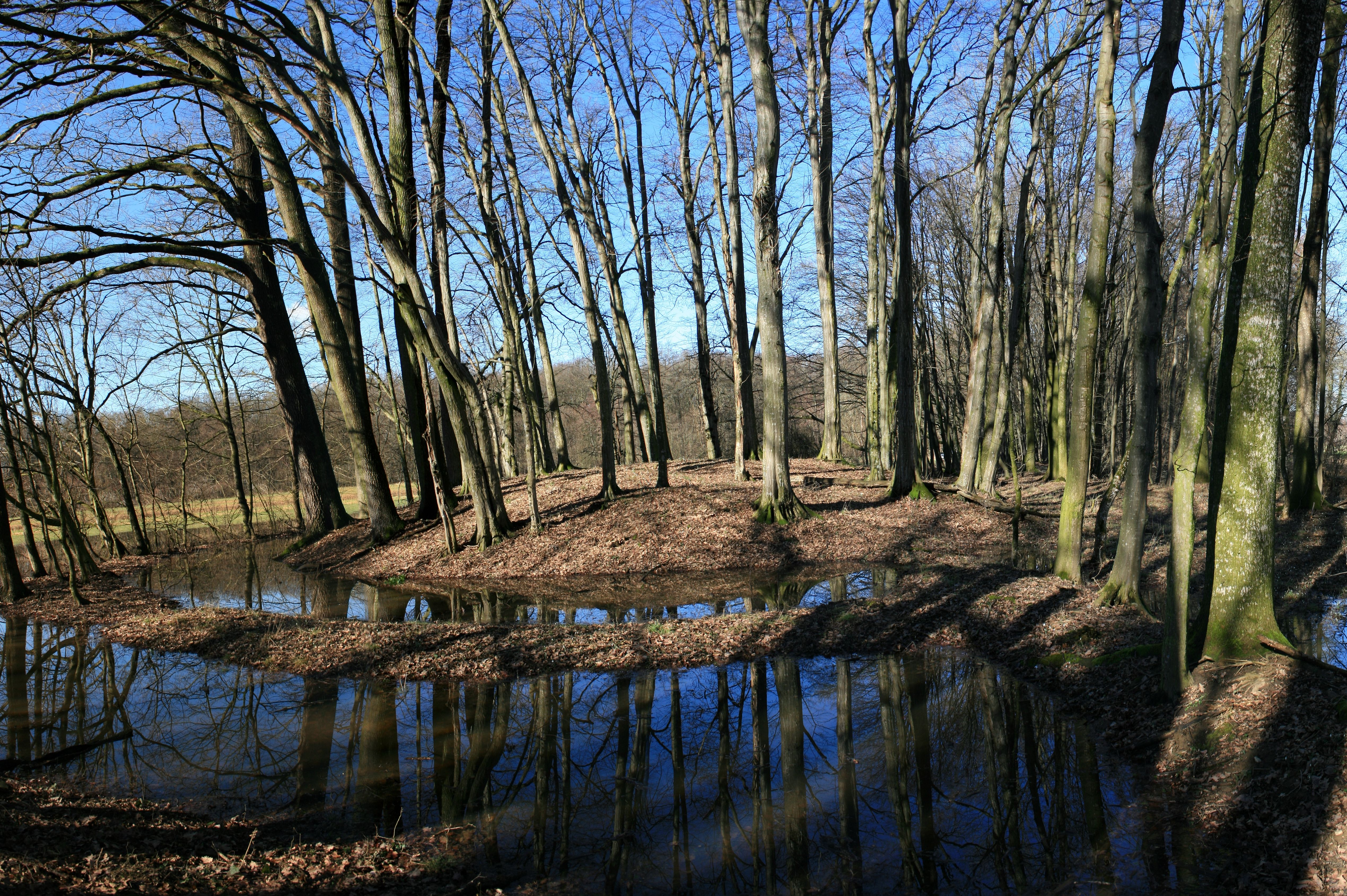 Rimskodobne gomile na poplavni ravnici Ščavnice, Suhače in Globetke This media shows a cultural heritage object of Slovenia with the EŠD number: 8845